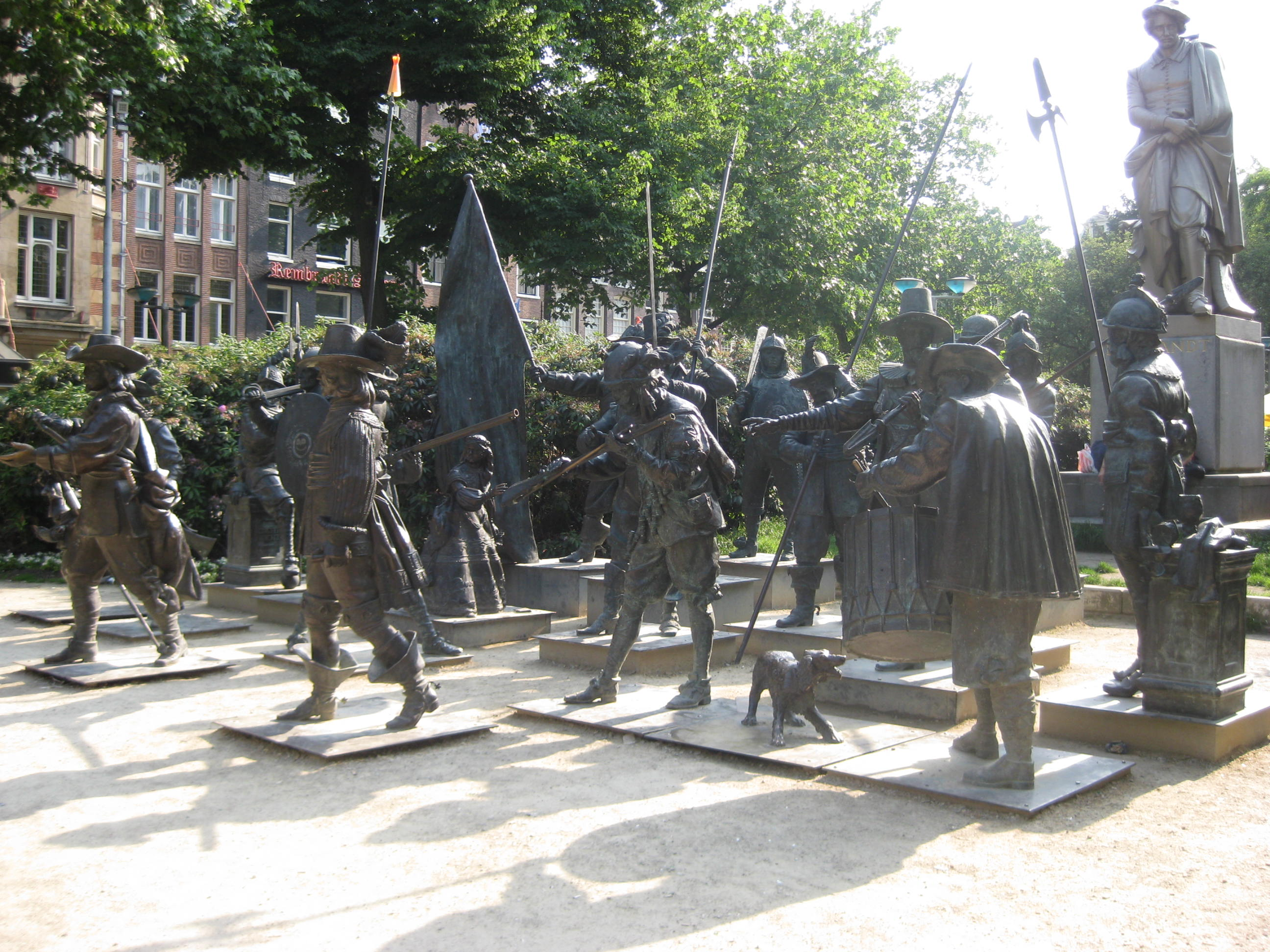 Beeldengroep "De Nachtwacht" van Alexander Taratynov op het Rembrandtplein in Amsterdam